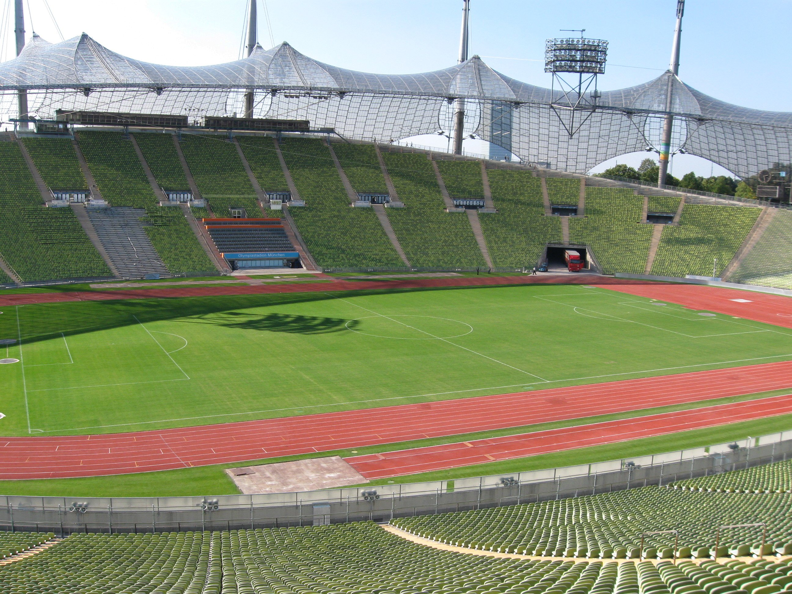 Olympiastadion, München